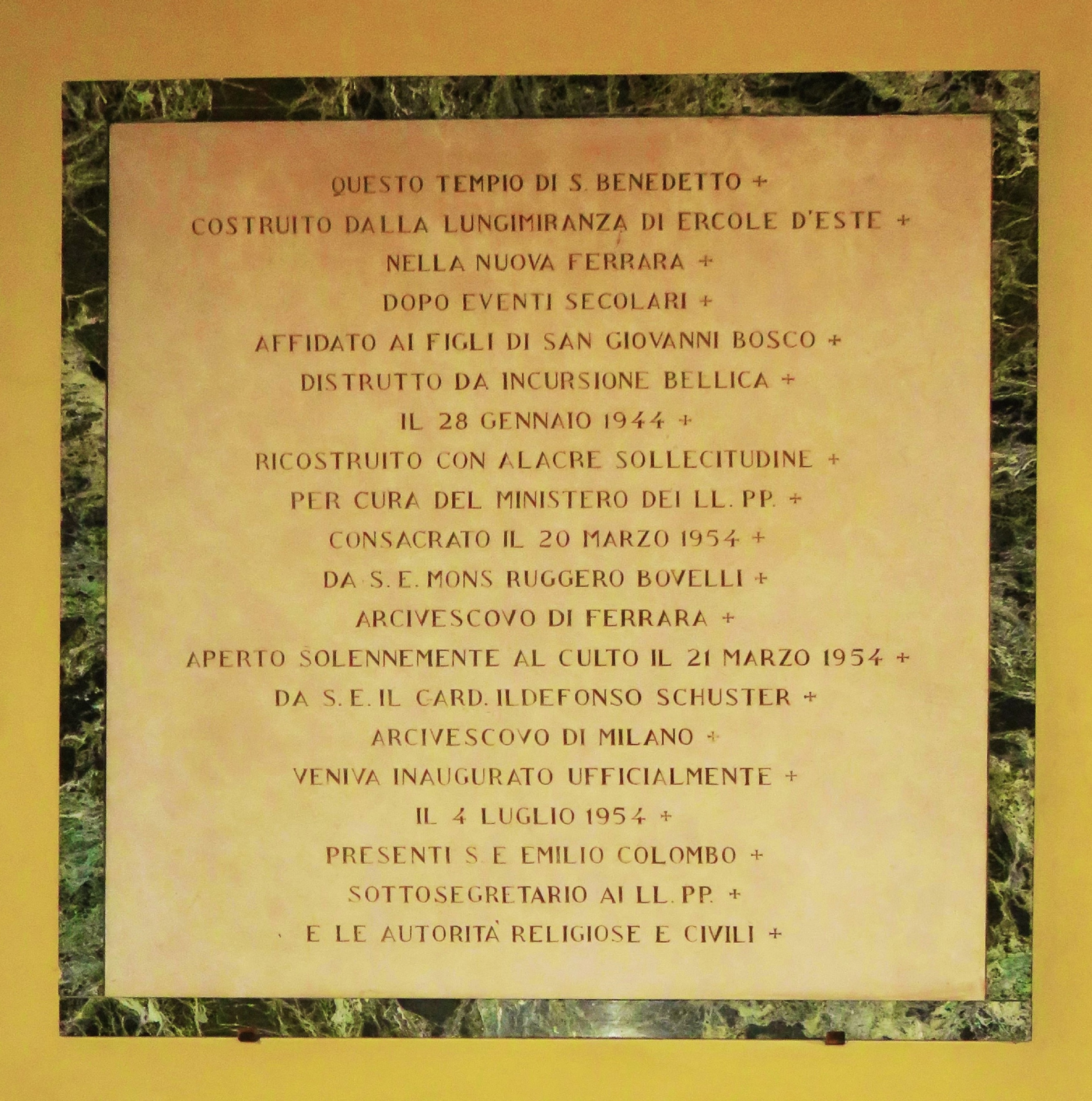 Chiesa di San Benedetto a Ferrara. Epigrafe nell'interno.